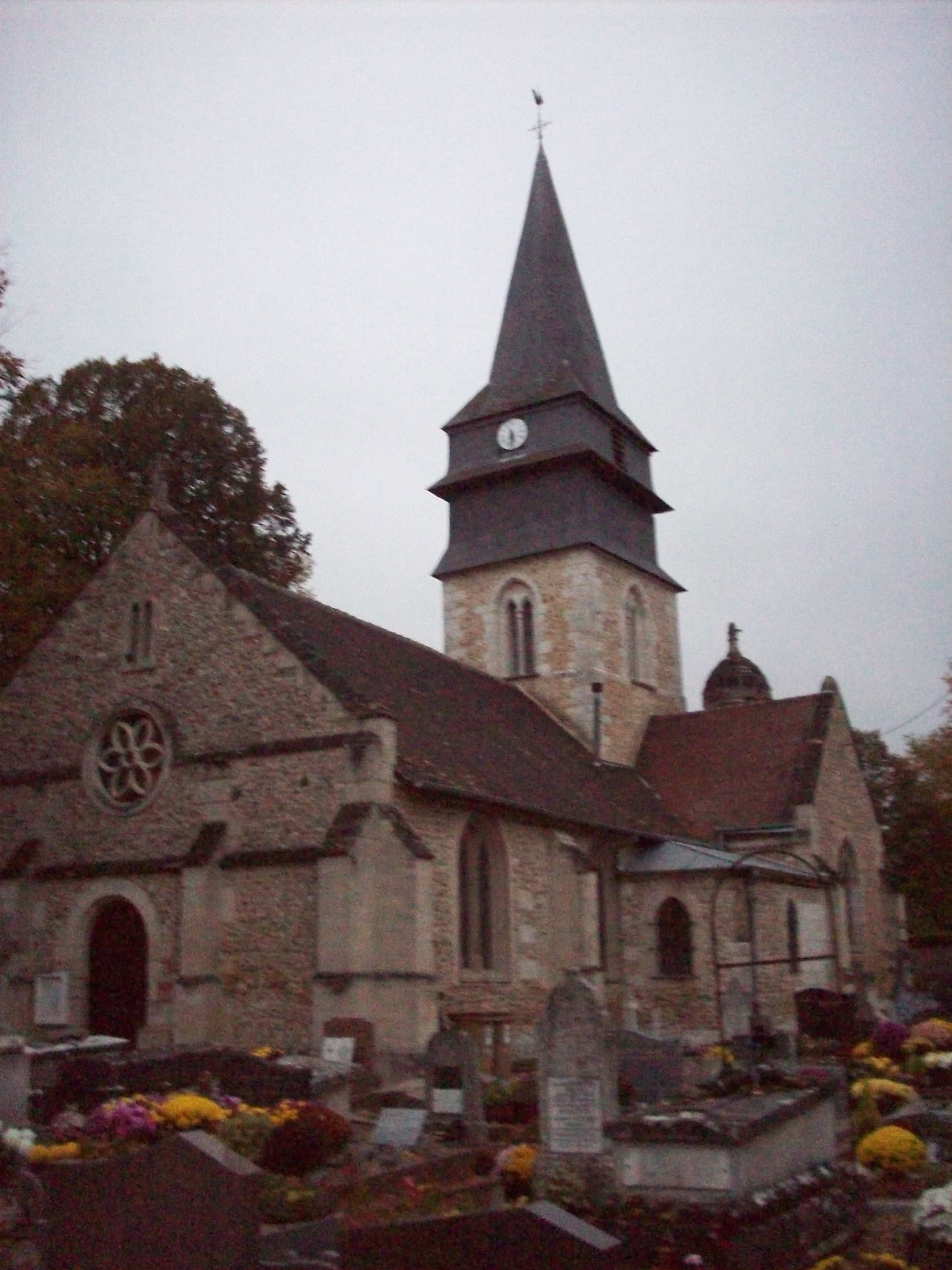 Église Saint Germain d'Heuqueville.